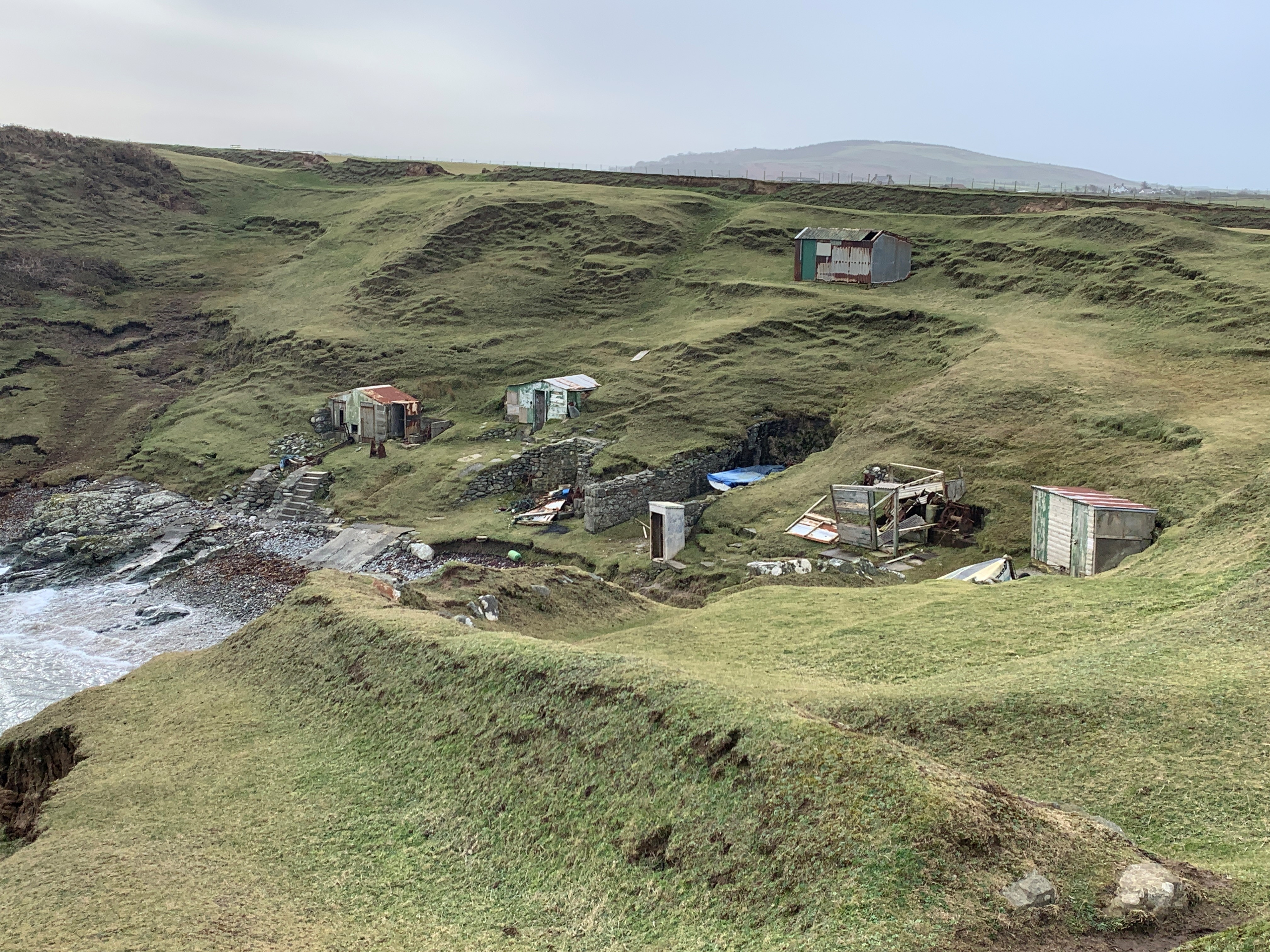 Porth Cychod